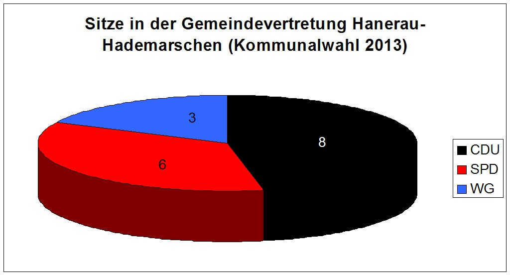 Sitzverteilung in der Gemeindevertretung Hanerau-Hademarschen (Kommunalwahl 2013)